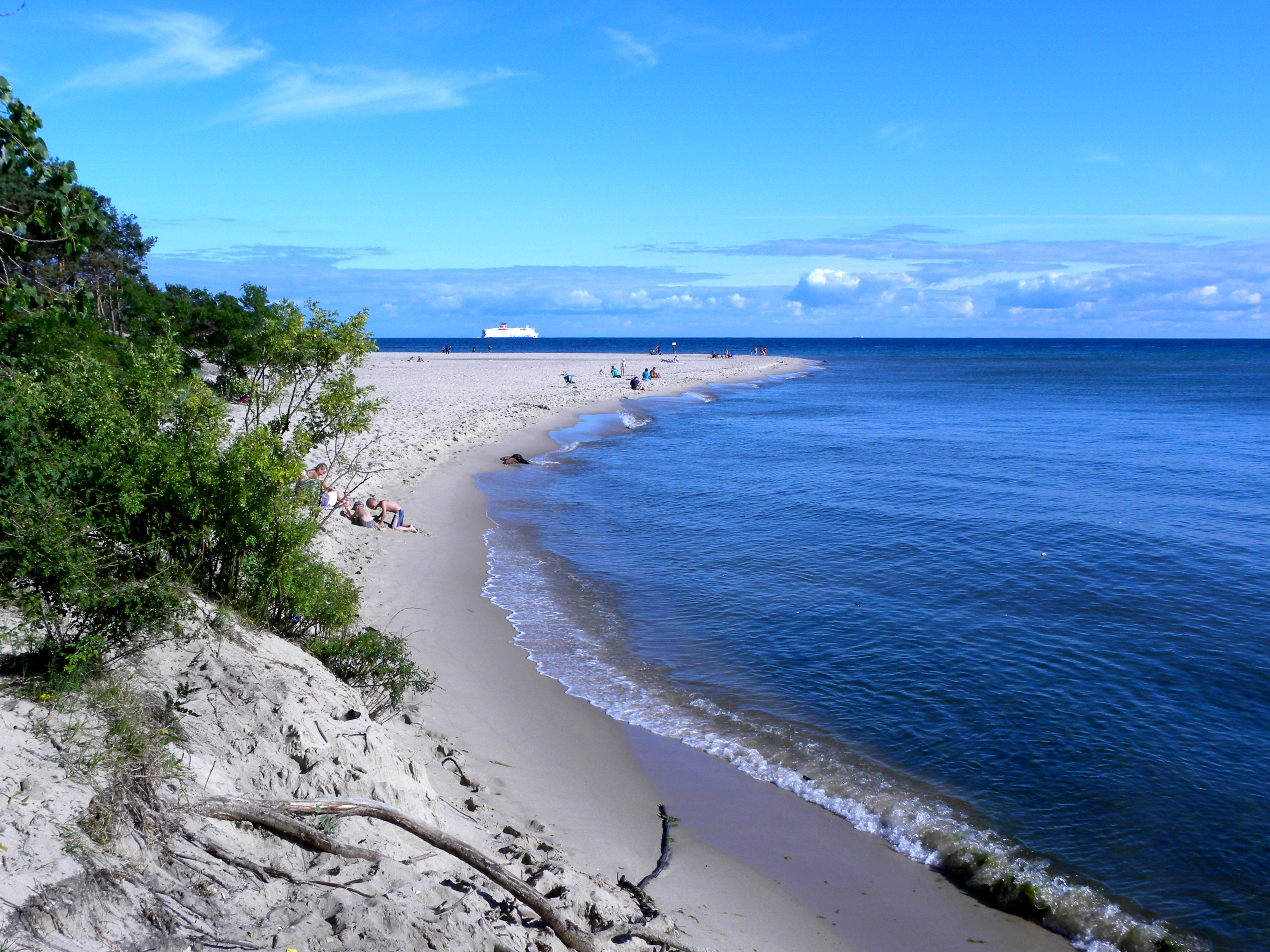 Mierzeja Helska - plaża na cyplu.